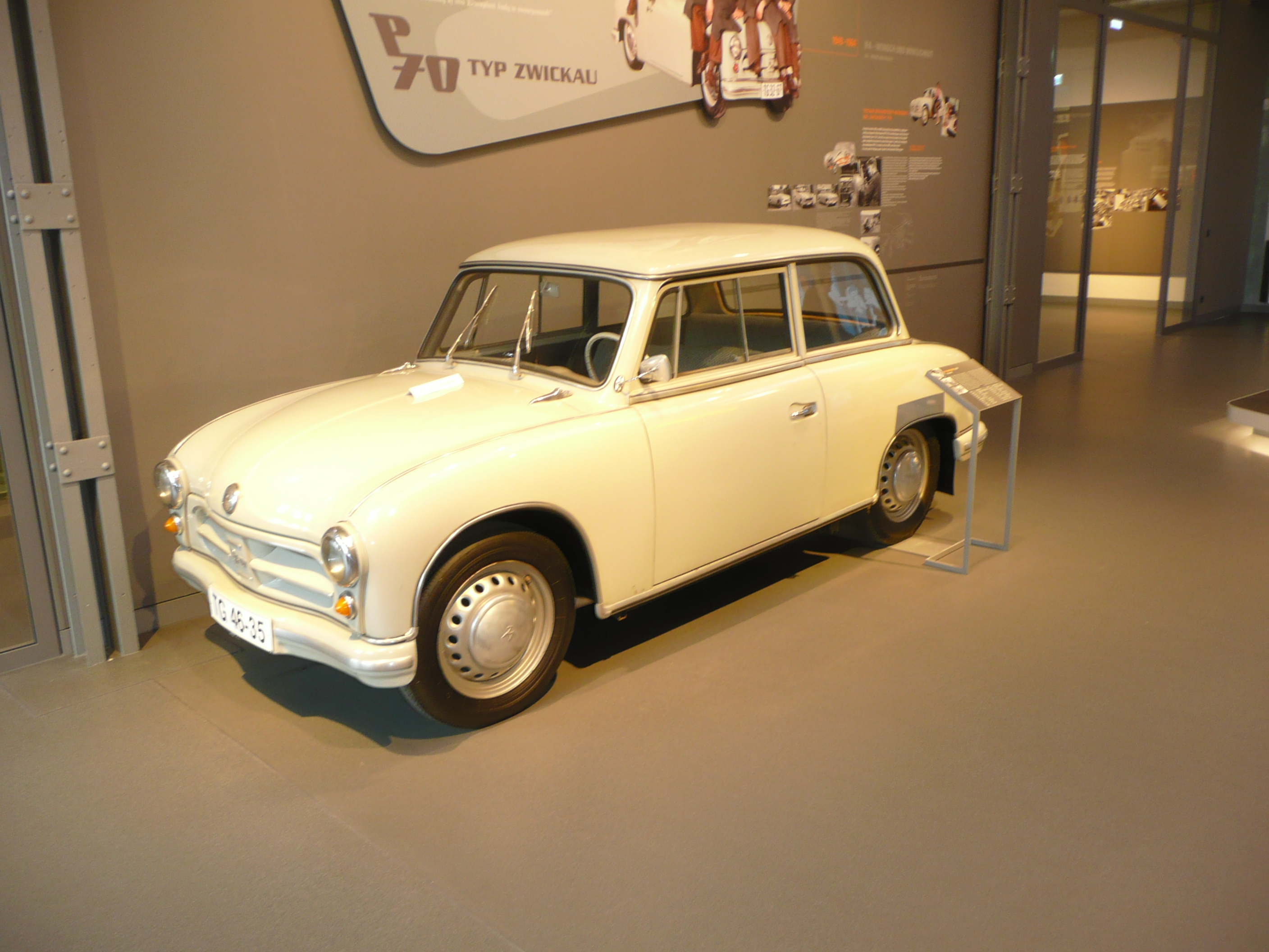 P 70 Limousine aus dem Jahr 1959 im August-Horch-Moseum Zwickau